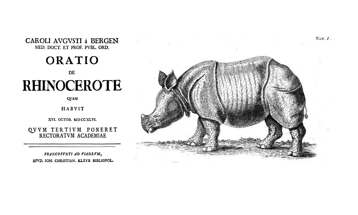 Titel und Tafel1 der Oratio de rhinocerote